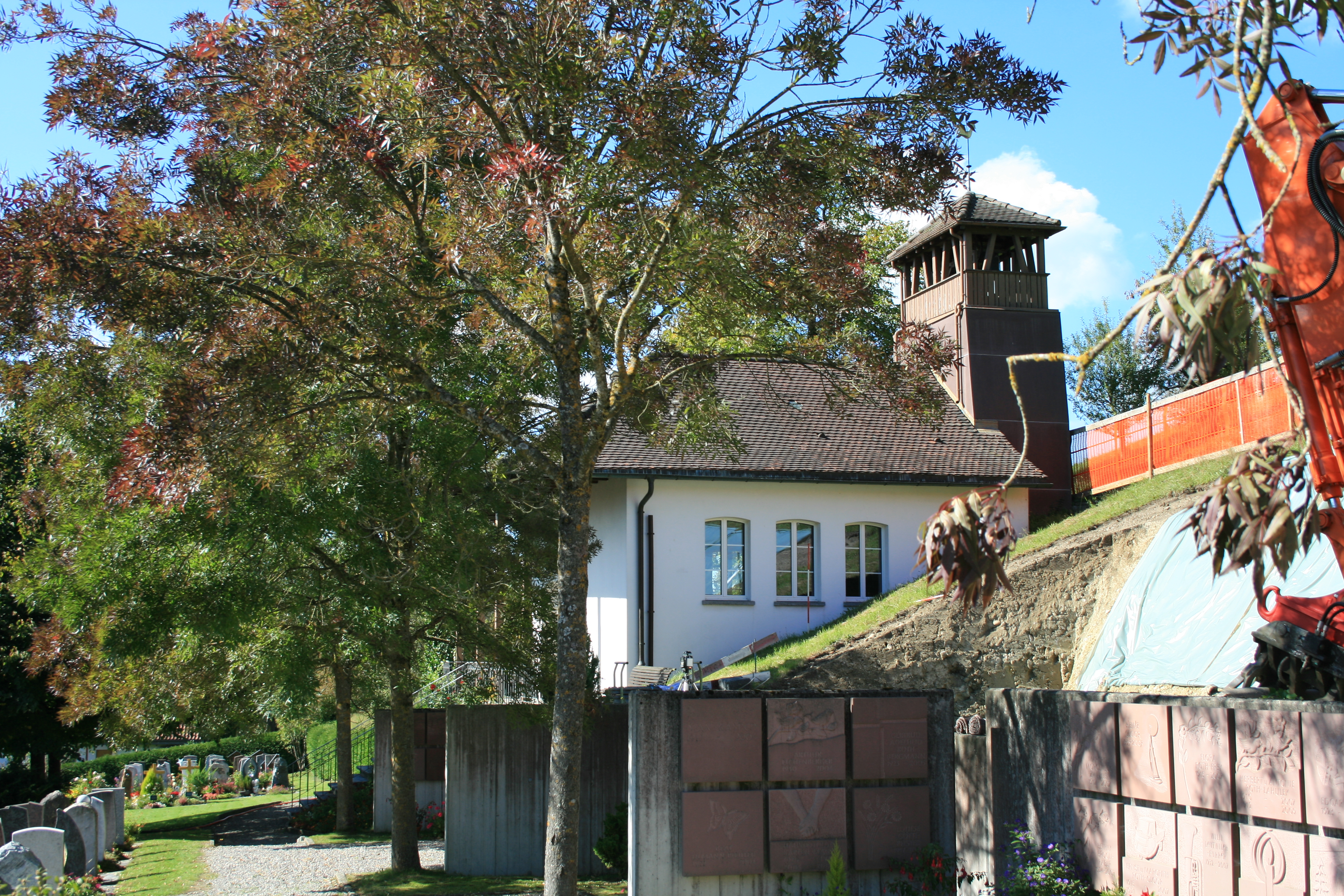 Kirchlein Zetzwil